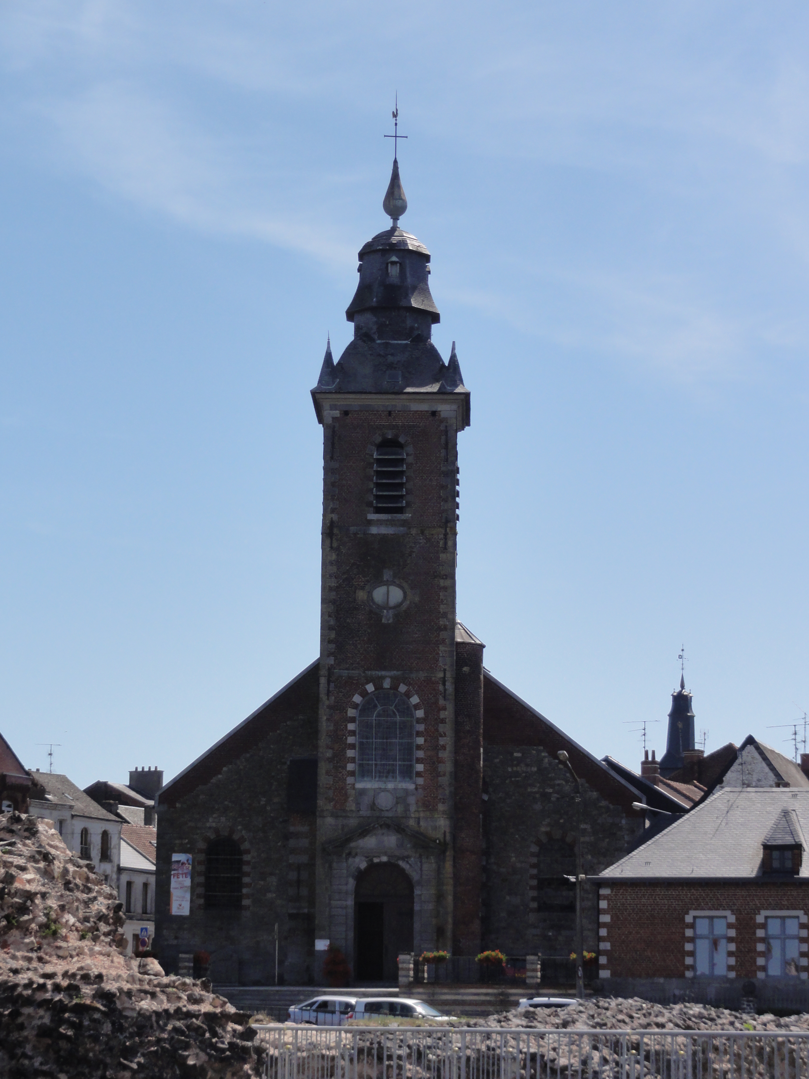 Bavay (Nord, Fr) église paroissiale Notre-Dame de l'Assomption This building is indexed in the Base Mérimée, a database of architectural heritage maintained by the French Ministry of Culture, under the references IA59000589 and type .